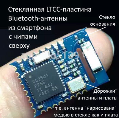 Типичное BT устройство из LTCC